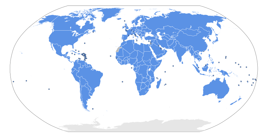 կ